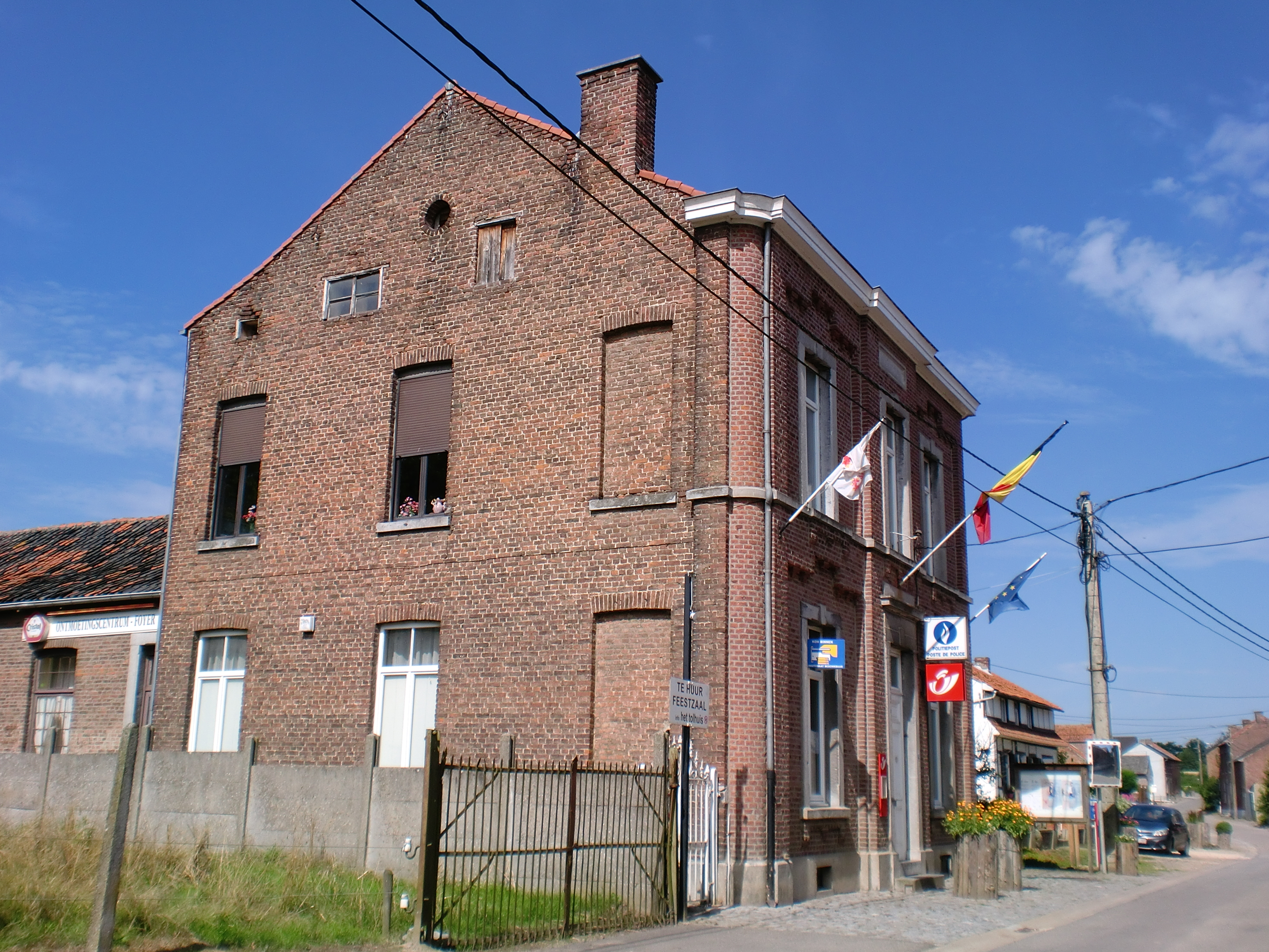 Gemeentehuis van Herstappe, tevens bankkantoor, postkantoor, politiebureau en lokale feestzaal.